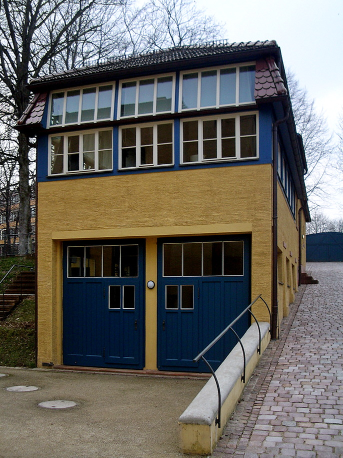 Chemnitz, Germany: Villa Esche by Henry van de Velde; Remise (garage)